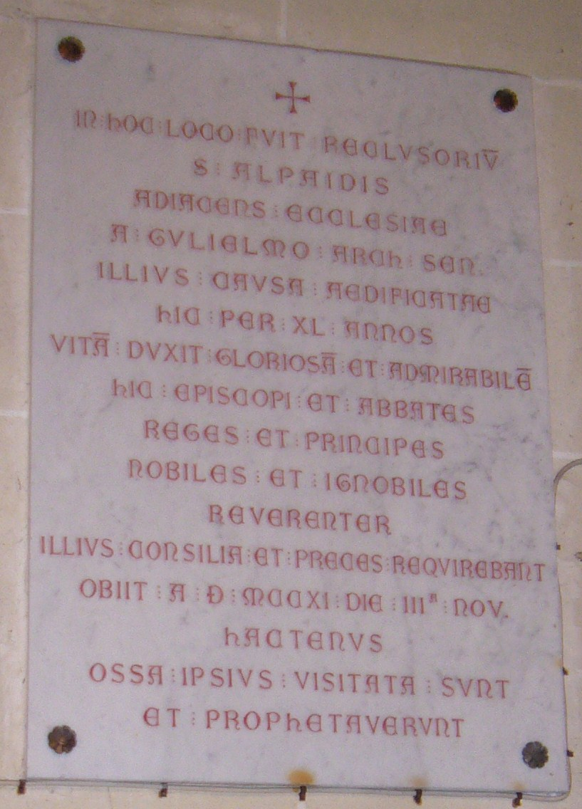 Église Notre-Dame-de-l'Assomption de Cudot: plaque exposant la vie de sainte Alpais